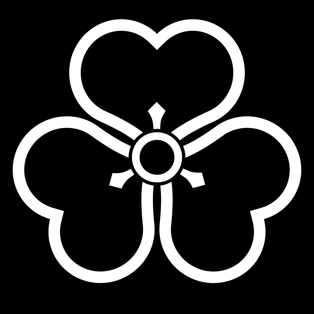 片喰紋の一種「陰片喰」。「陰酢漿草」とも。定番家紋である片喰を陰紋化した家紋。